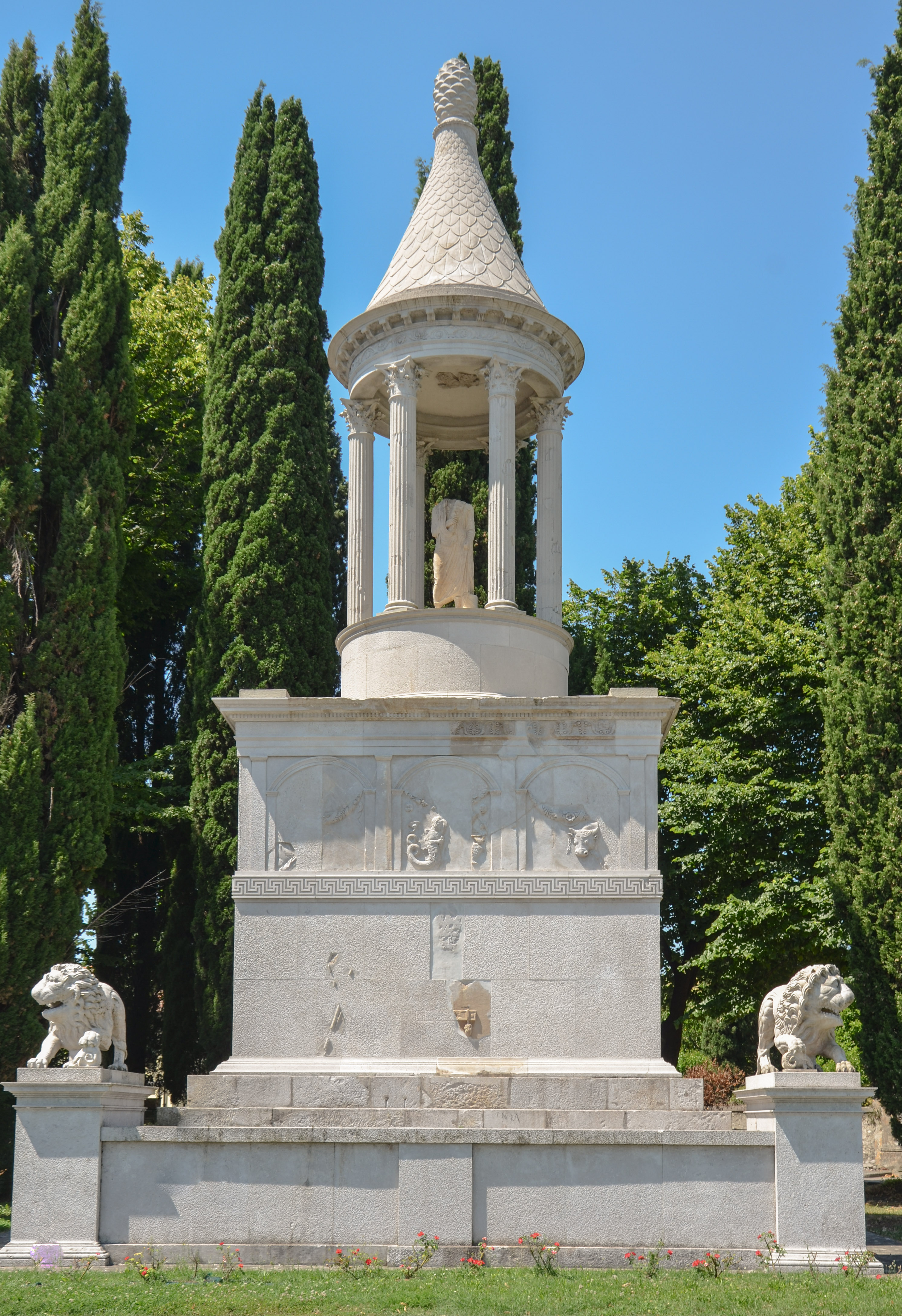 Mausoleo Candia, Aquileia, Italy